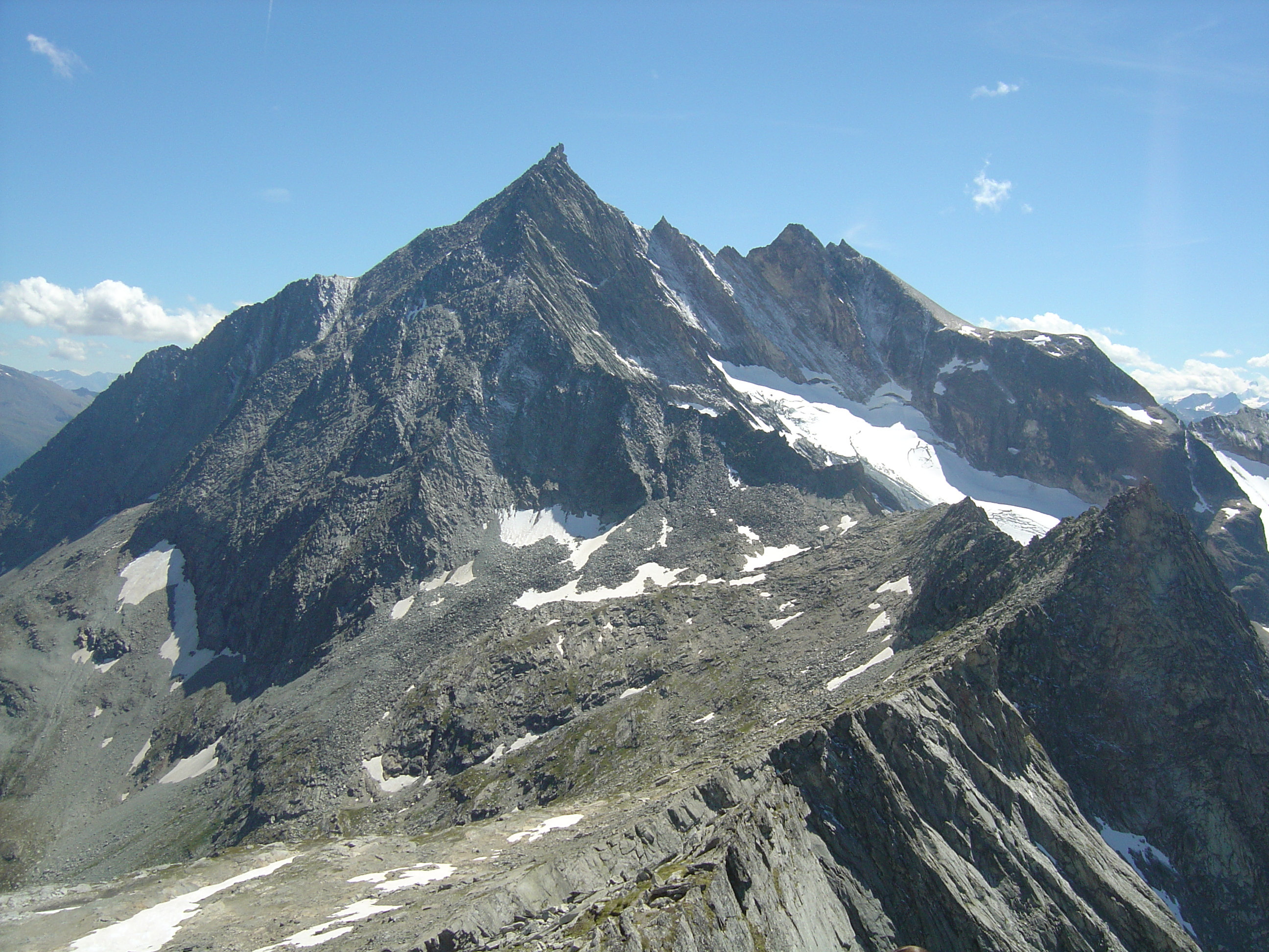 La pointe de l'Echelle (3422m) vue depuis la pointe de l'Observatoire (3015m)